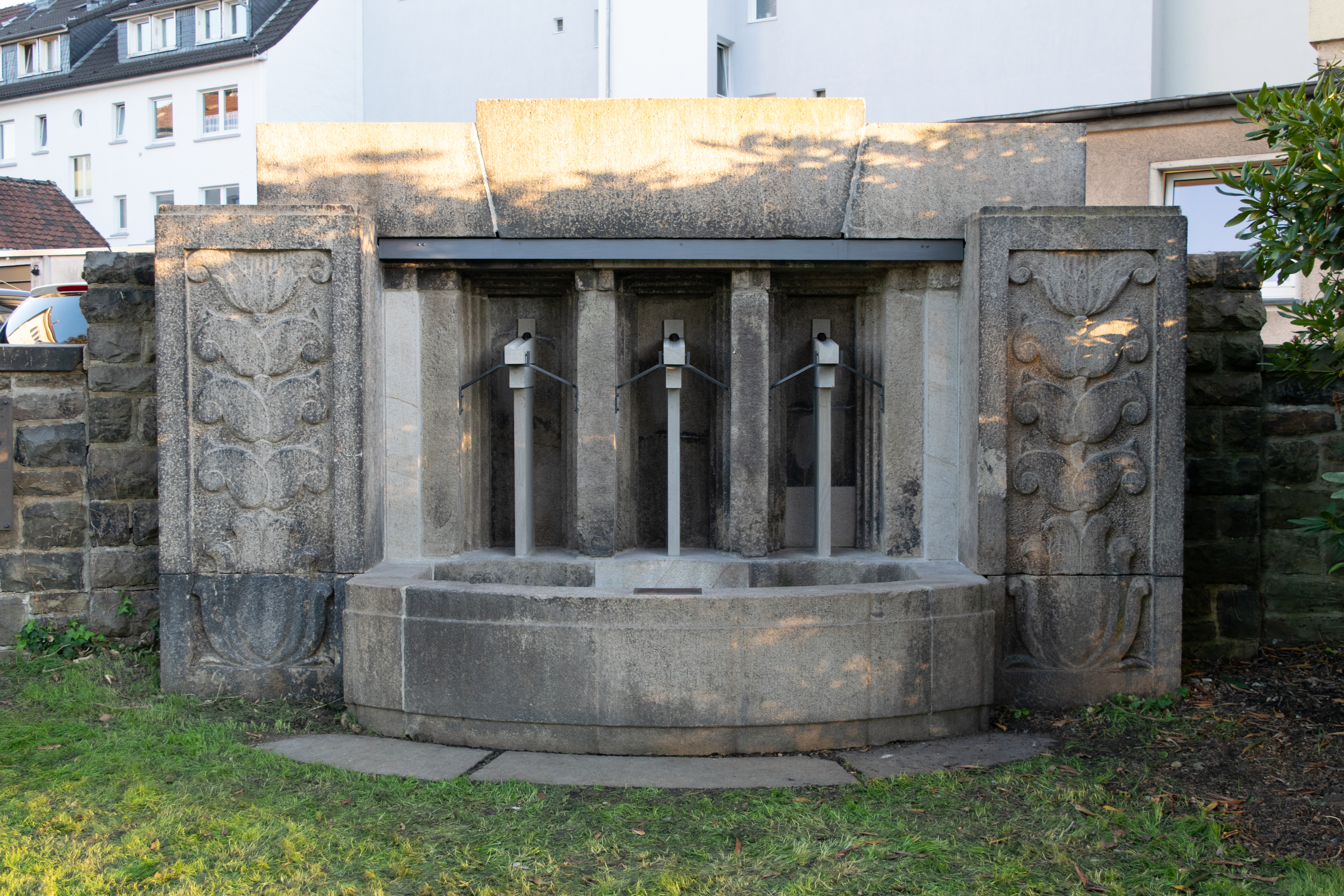 Bahnhofstraße, Wuppertal